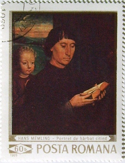 Source: Post of Romania